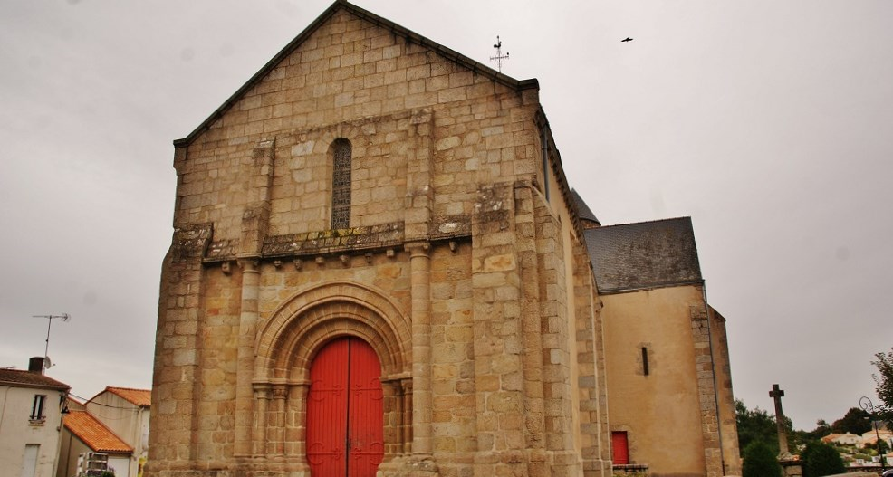 église St Laurent